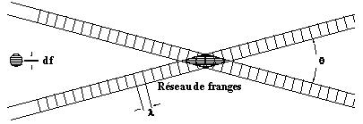 Ce dessin montre un réseau de franges pour expliquer la méthode de mesure de LDA.